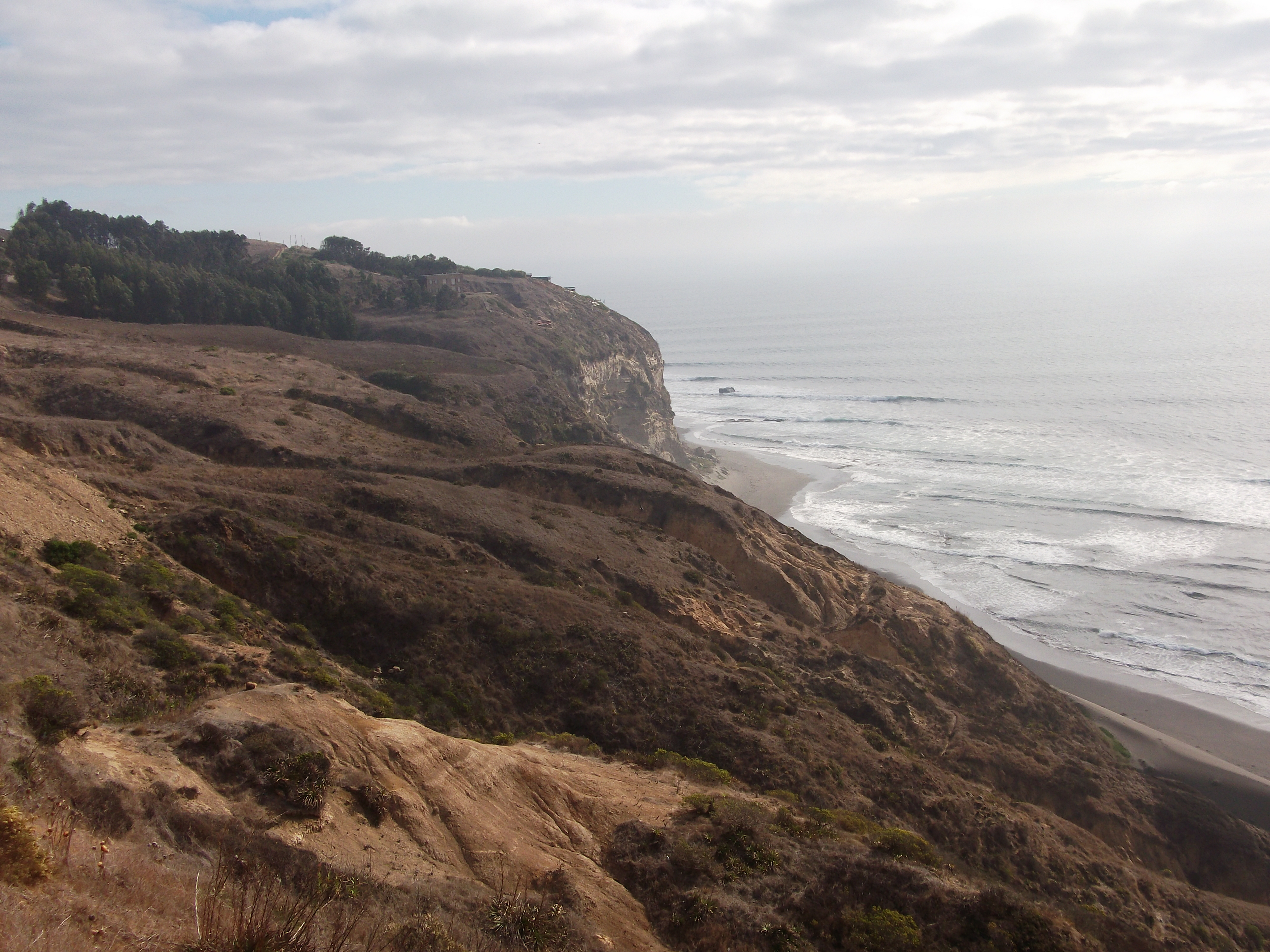 Mirador Matanza.